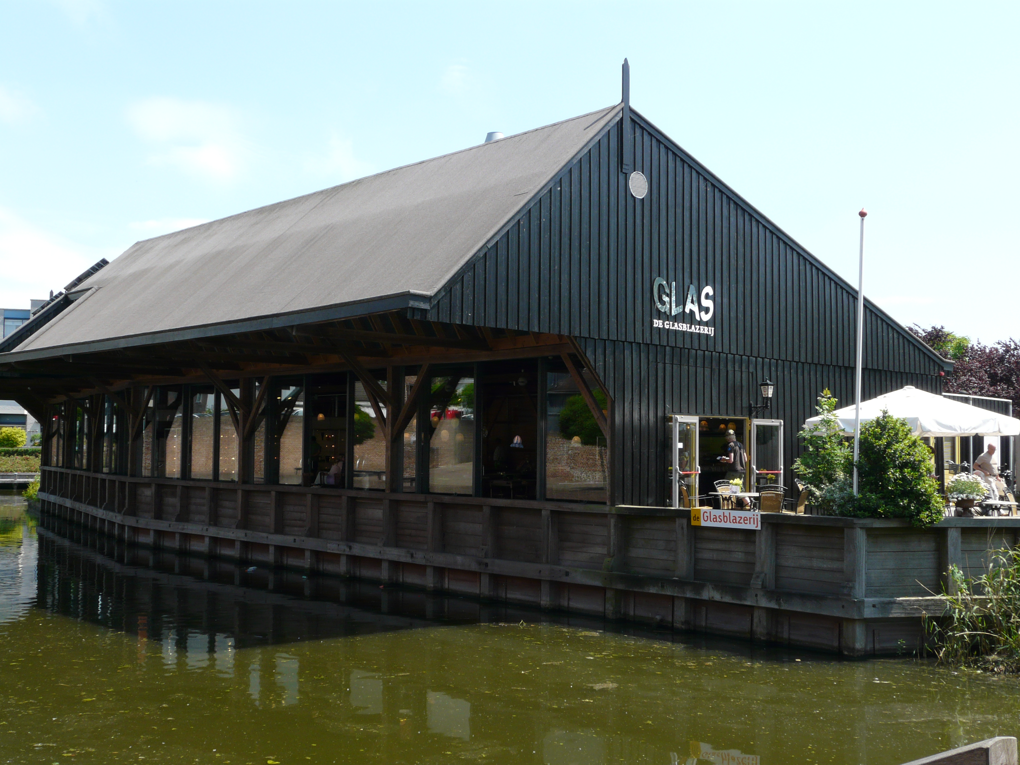 Zicht op een deel van het Glascentrum Leerdam met de Glasblazerij onderdeel van het Nationaal Glasmuseum gevestigd aan de Zuidwal, 4141 BE Leerdam